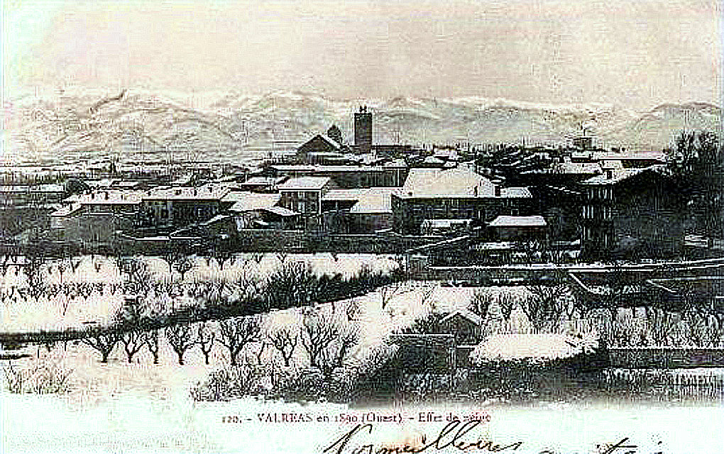 Valréas recouvert par la neige au cours de l'hiver 1890-1891